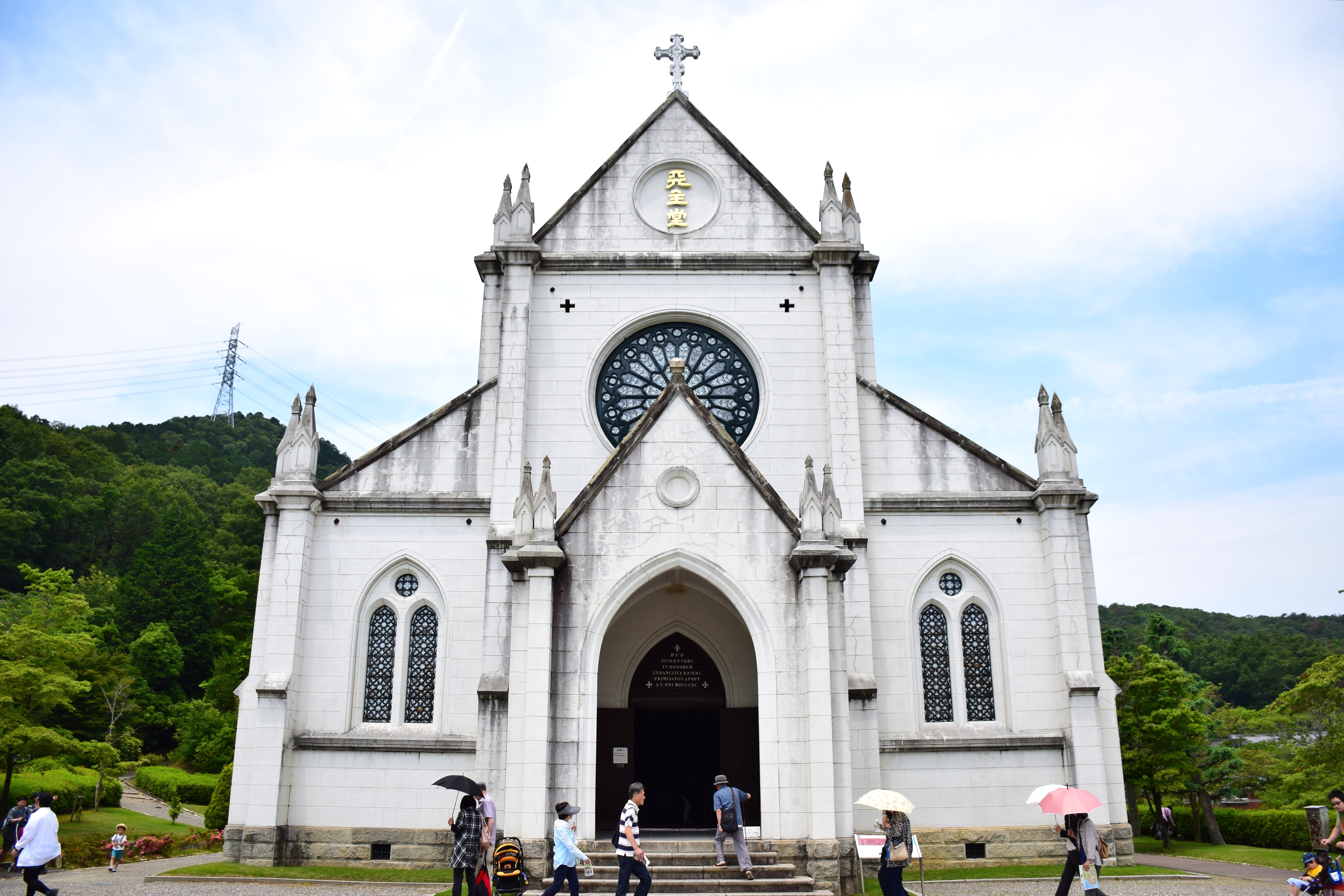 聖ザビエル天主堂